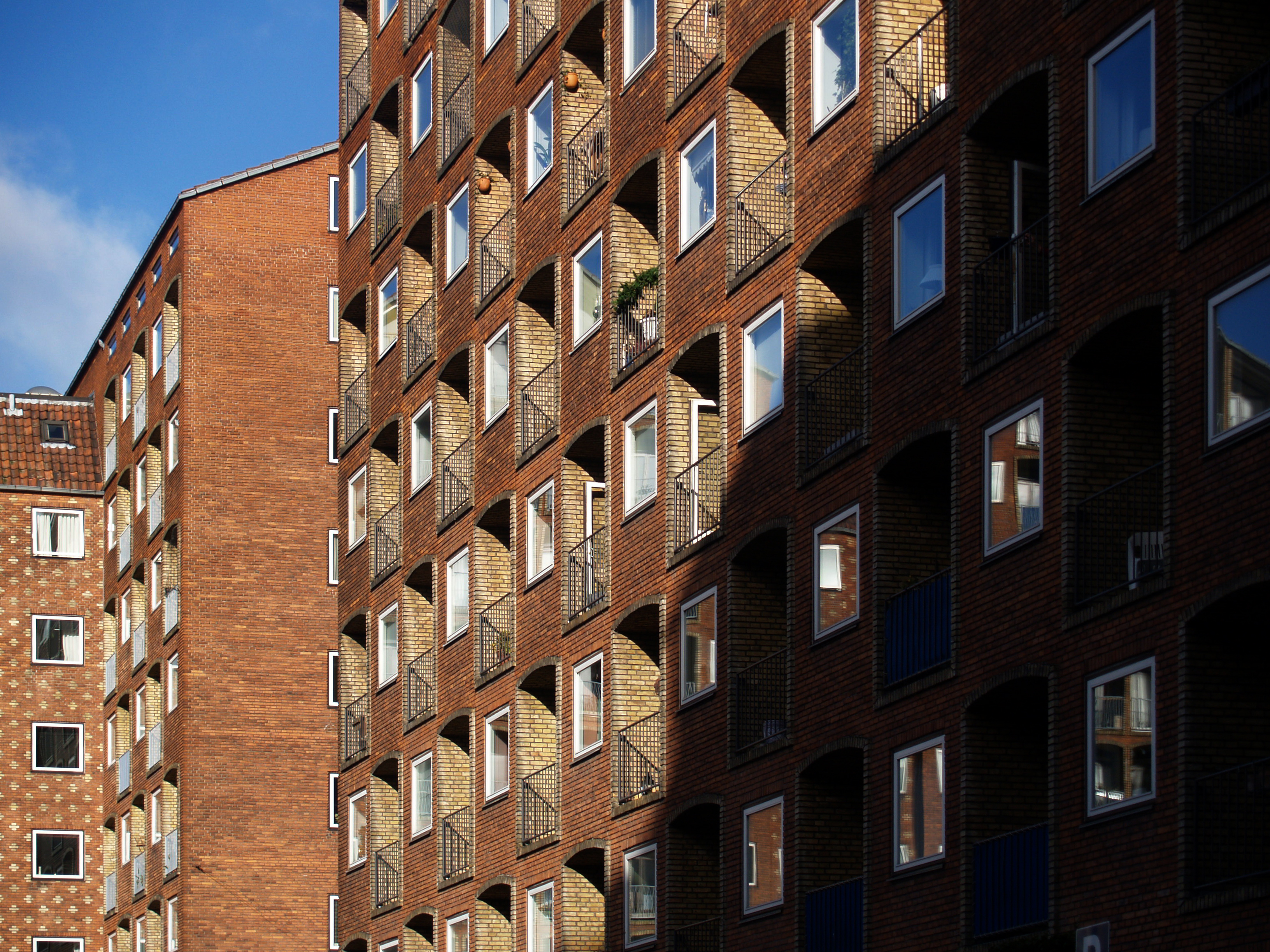 dronningegården housing, copenhagen, 1943-1958. architects: kay fisker, 1893-1965, with eske kristensen and c.f. møller.